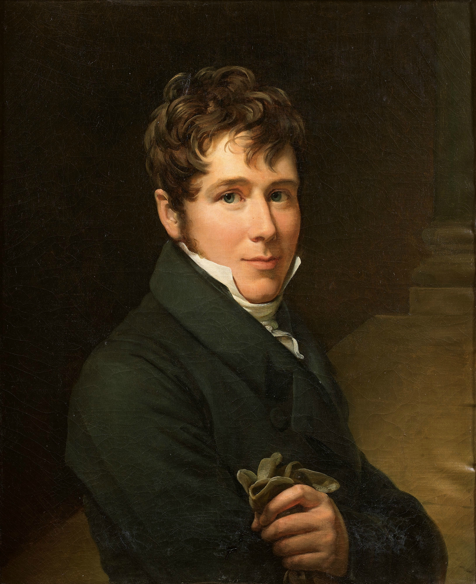 François Gérard, dit Baron Gérard (Rome 1770-, Portrait de Charles- Just- François Victurnien, 4è prince de Beauvau (1793-1864)